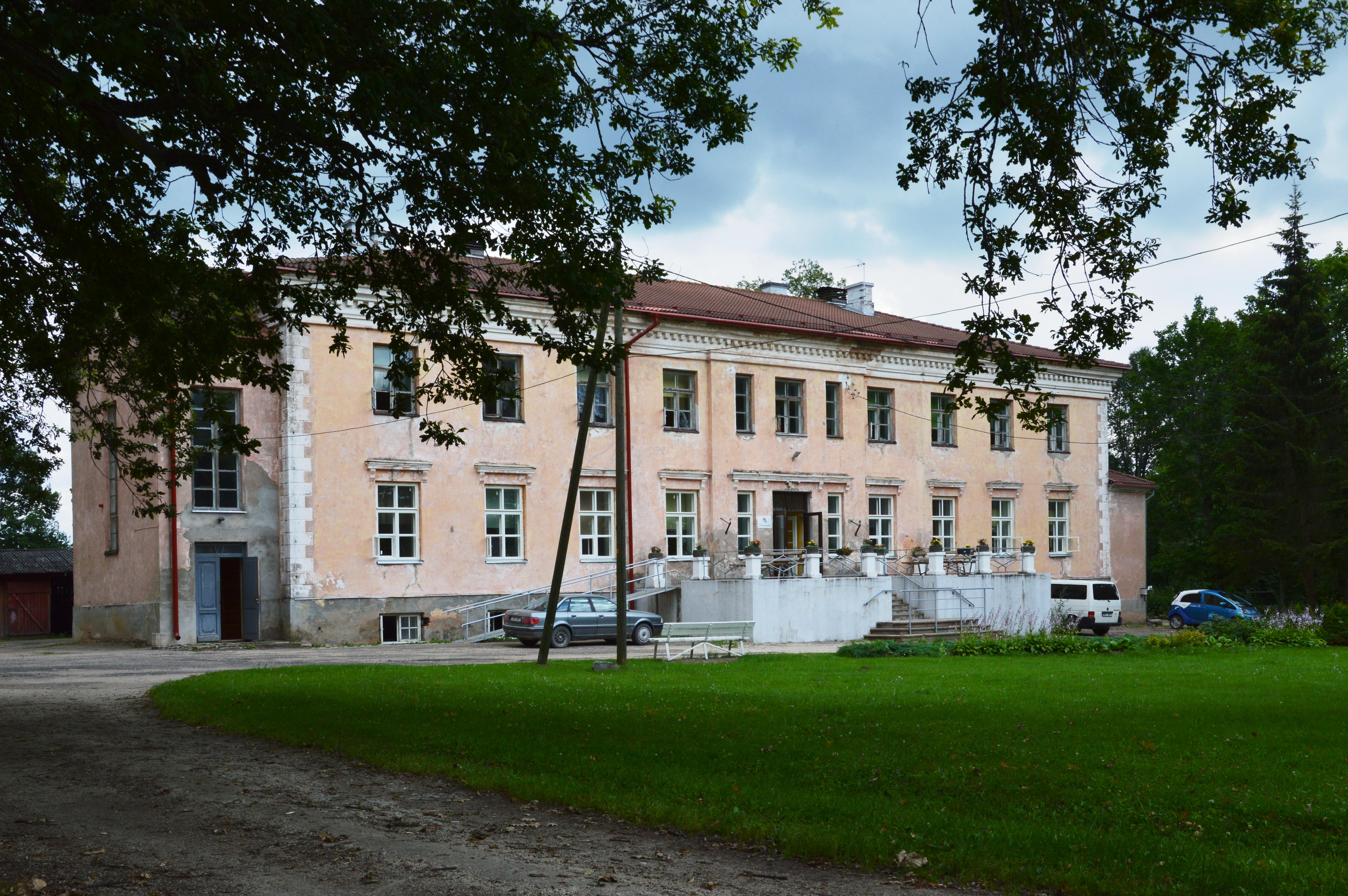 Paju mõisa peahoone